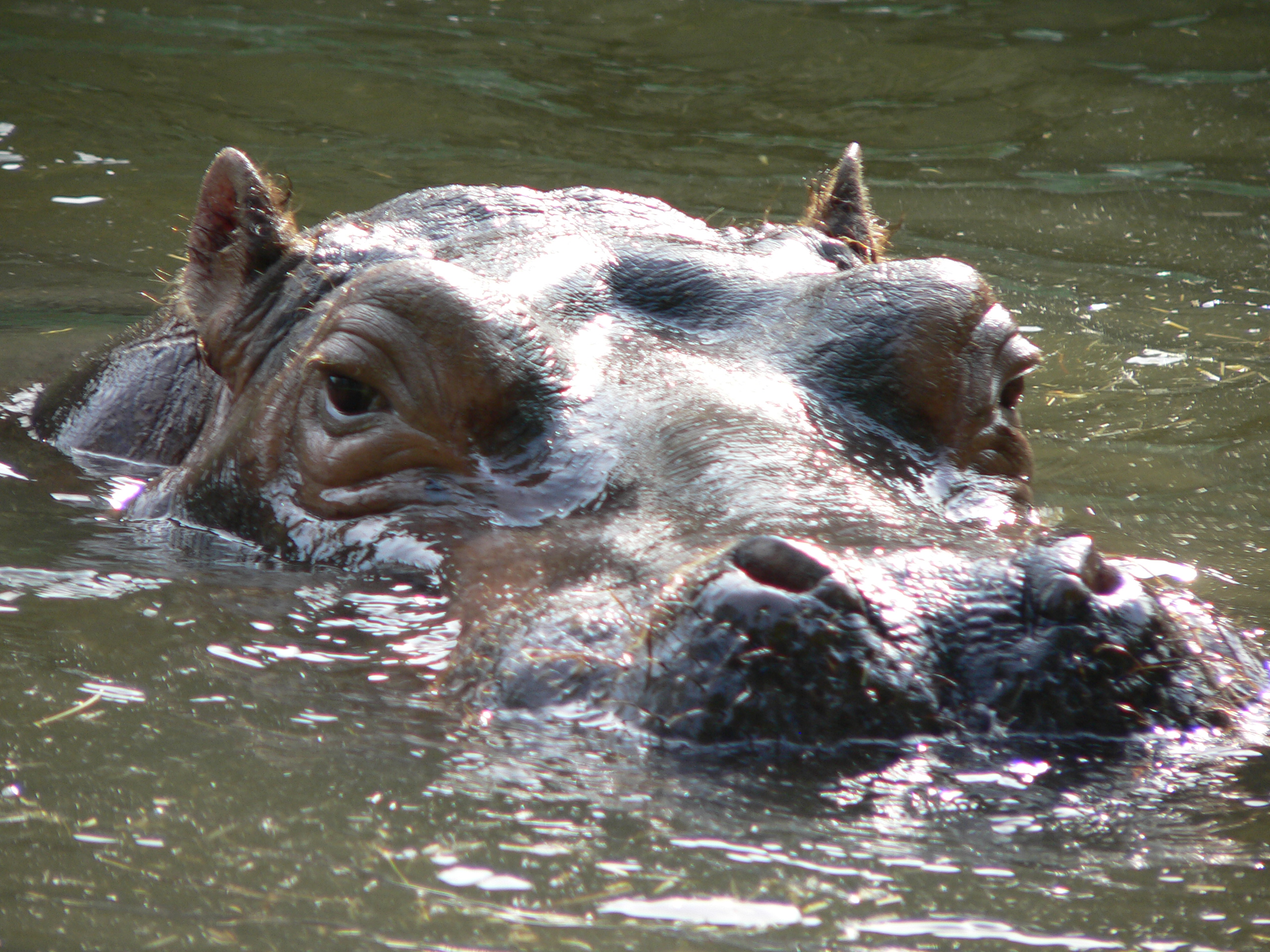 Nilpferd